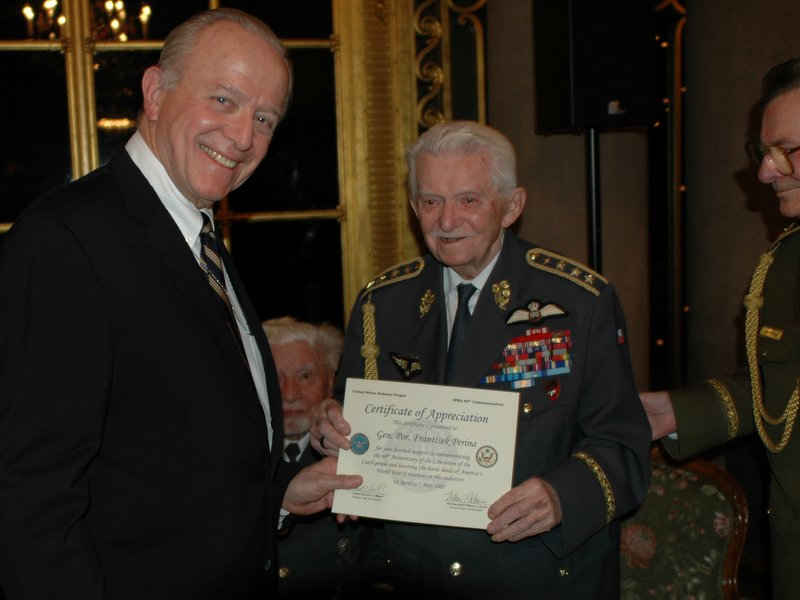 Gen. Por. František Peřina a William J. Cabanis